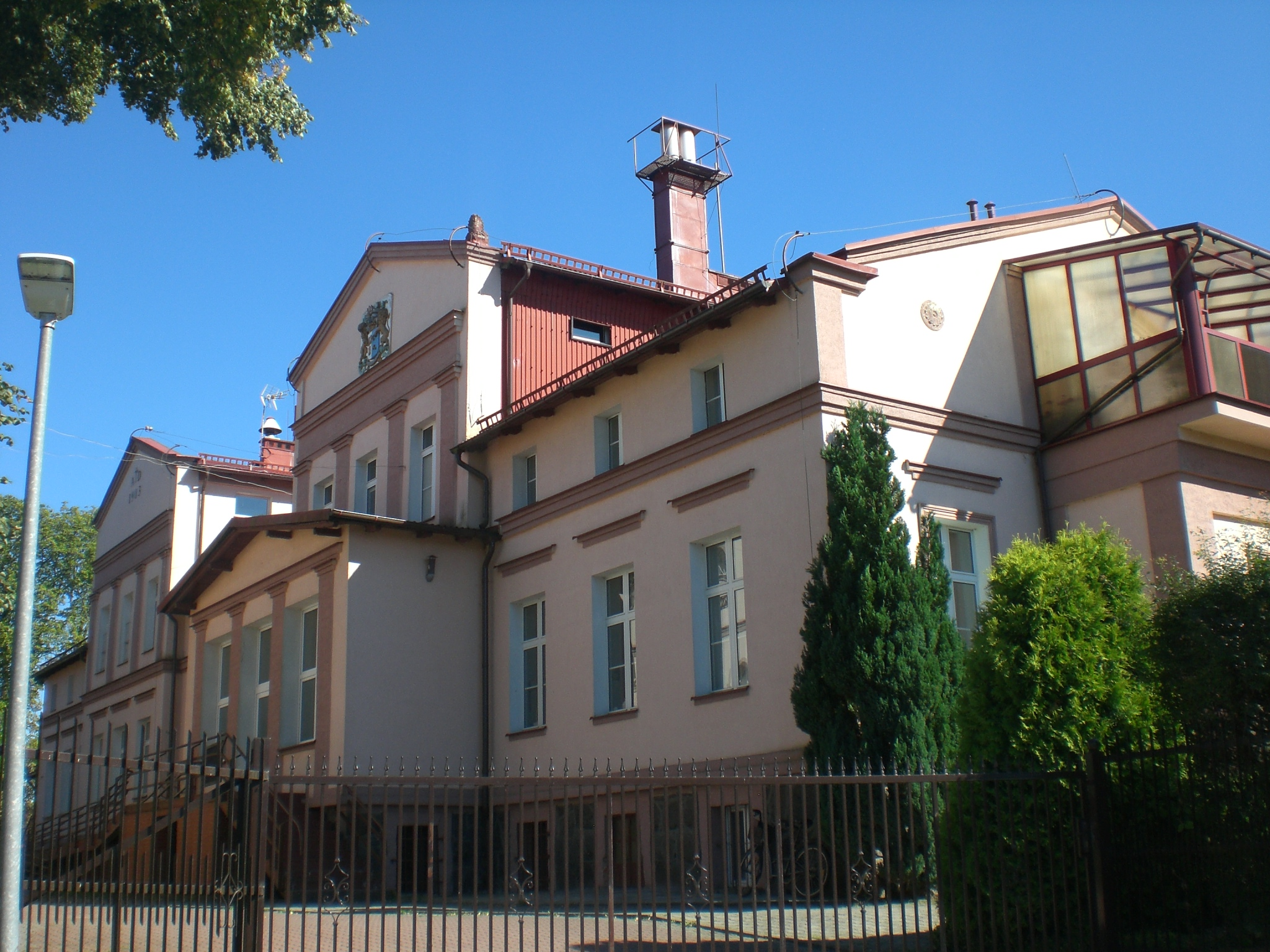 Parchowo, DPS Zgromadzenia Sióstr Benedyktynek Samarytanek